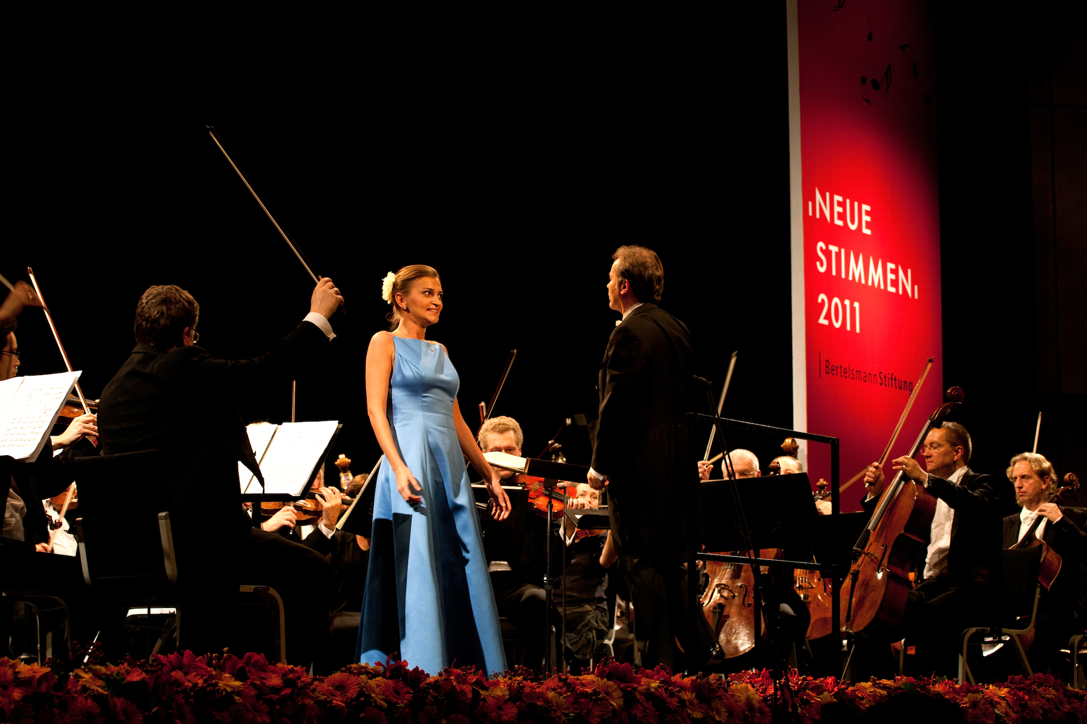 Finalkonzert